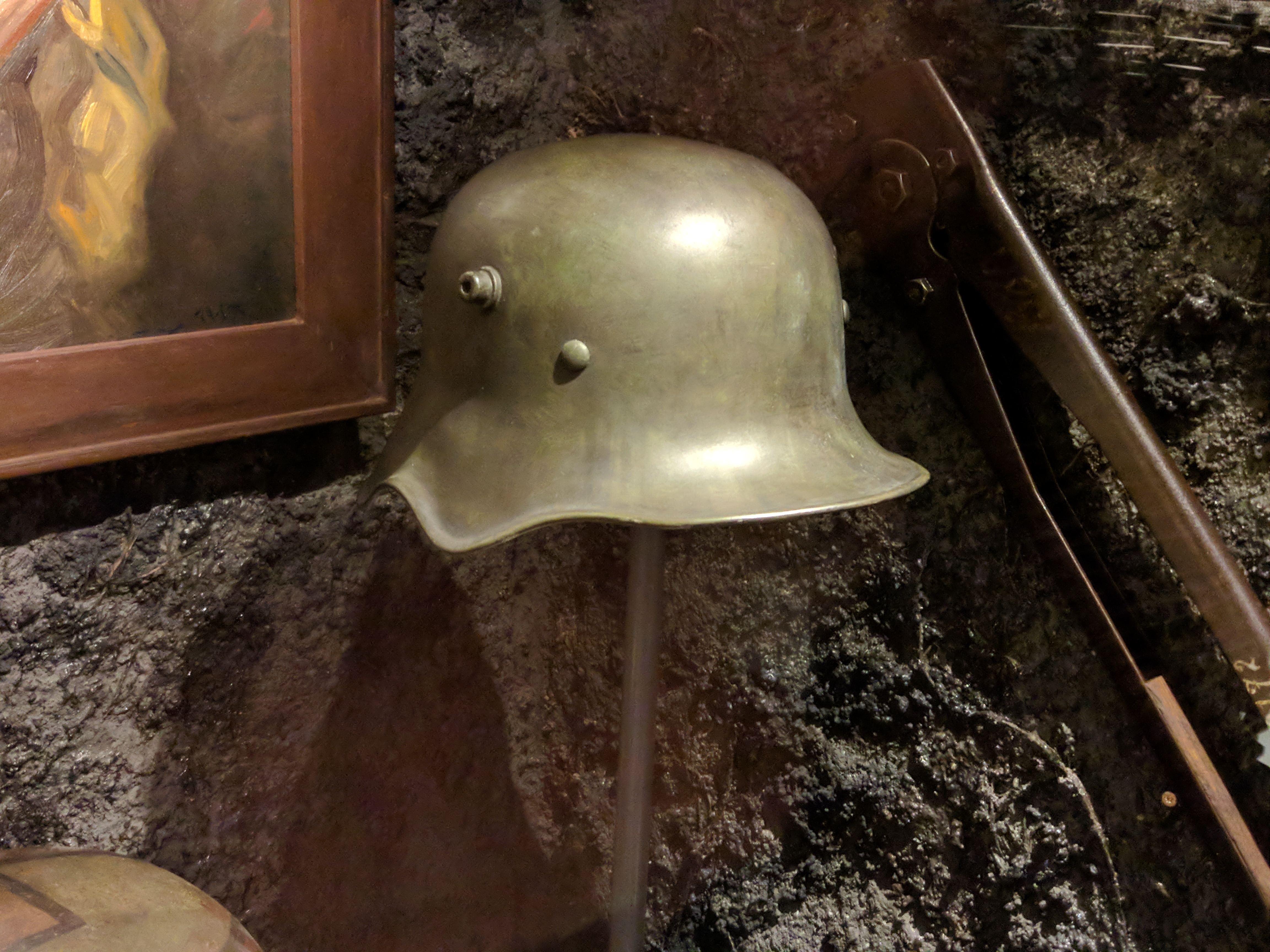 Stahlhelm čelada model 18